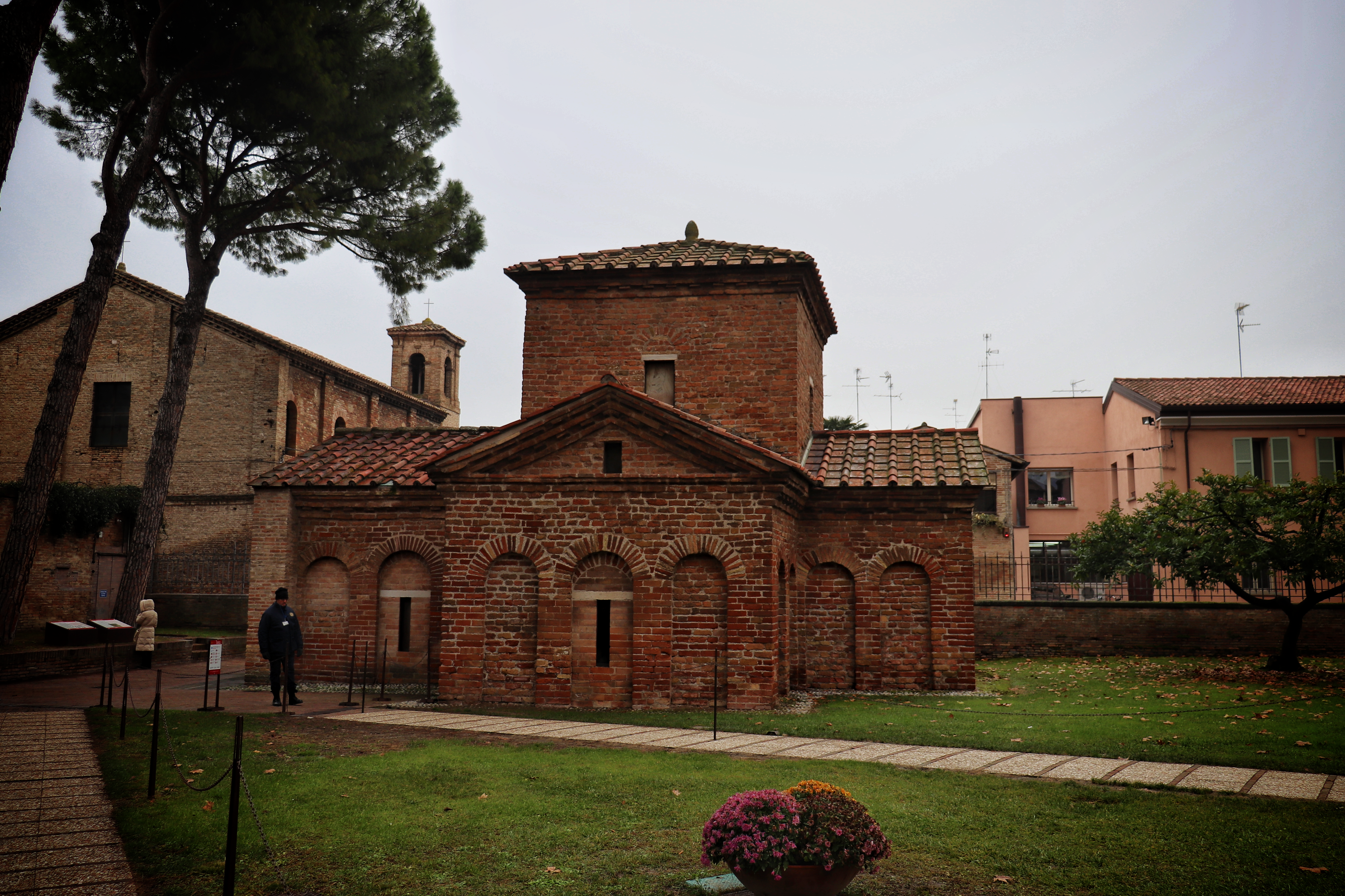 Mausoleo di Galla Placidia This is a photo of a monument which is part of cultural heritage of Italy.